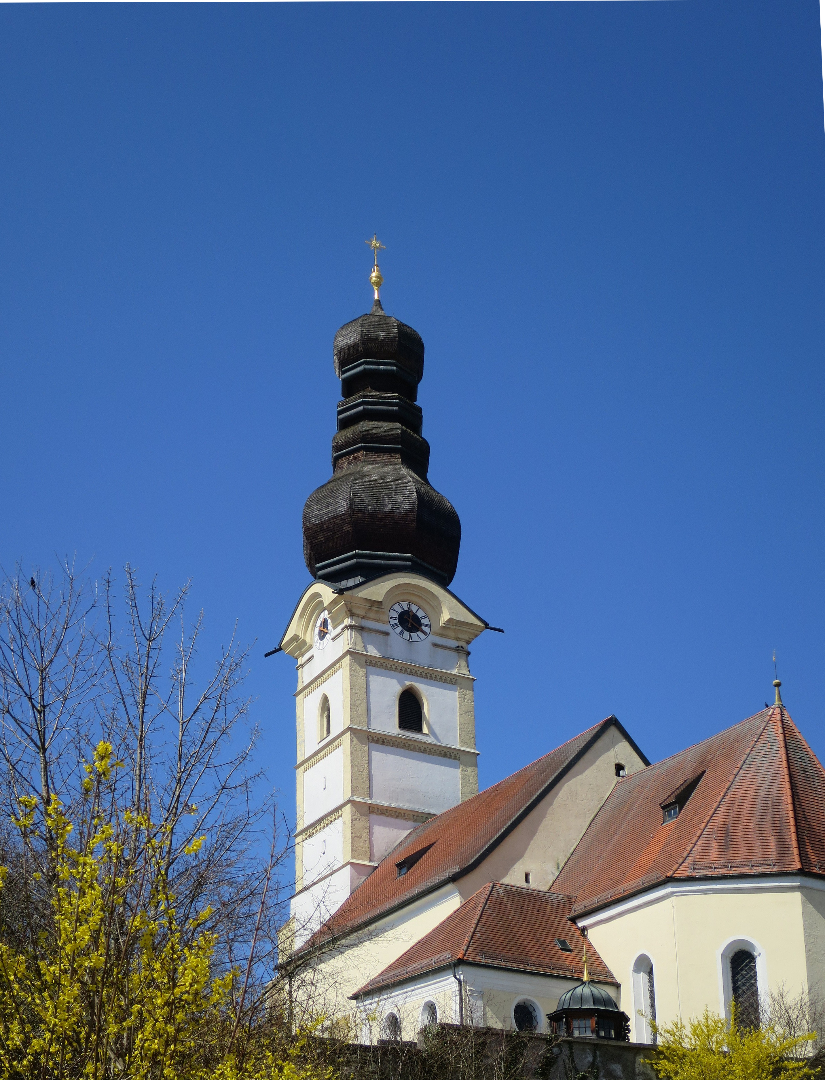 Außenansicht der Kirche